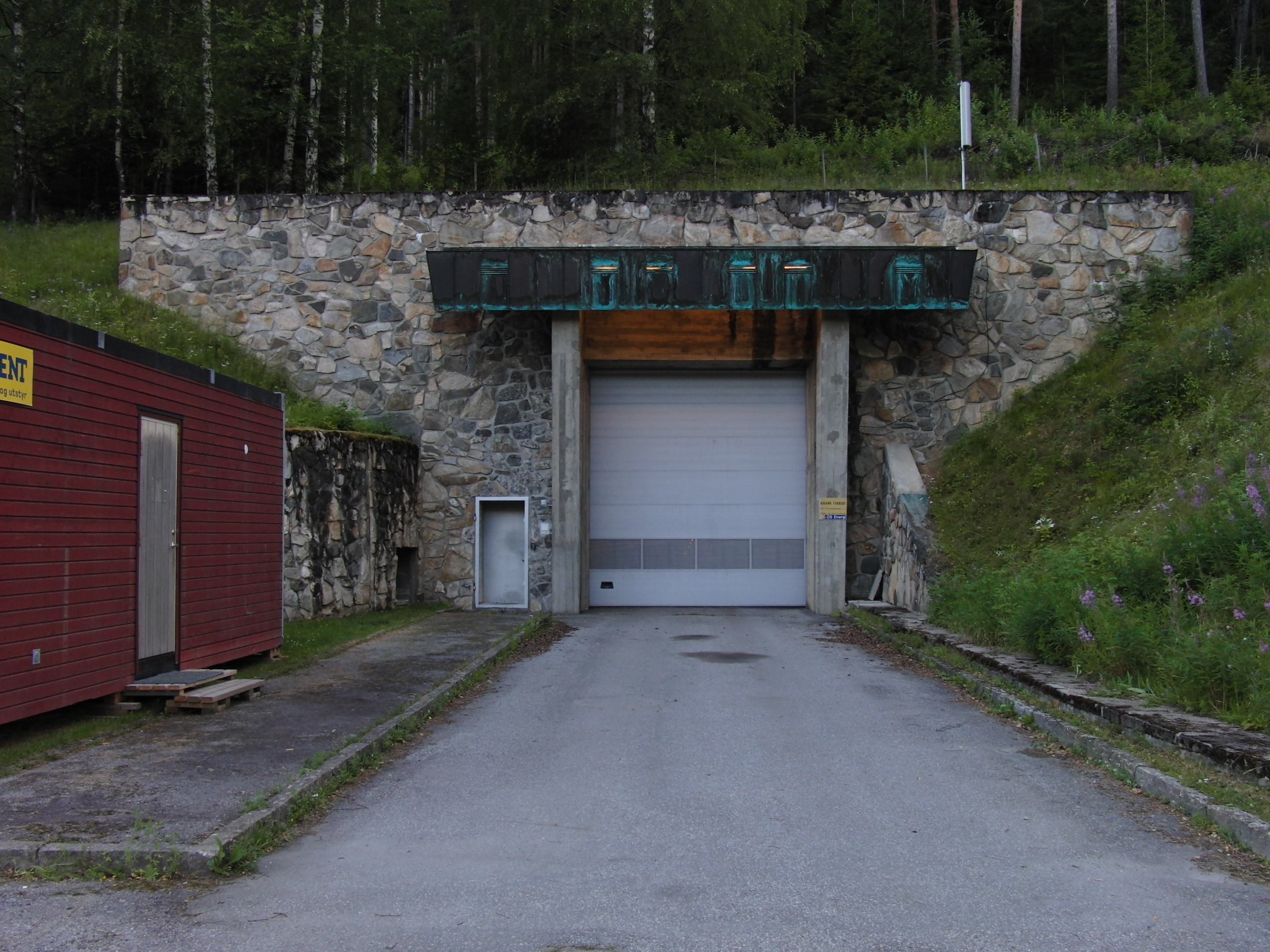 Nes kraftverk